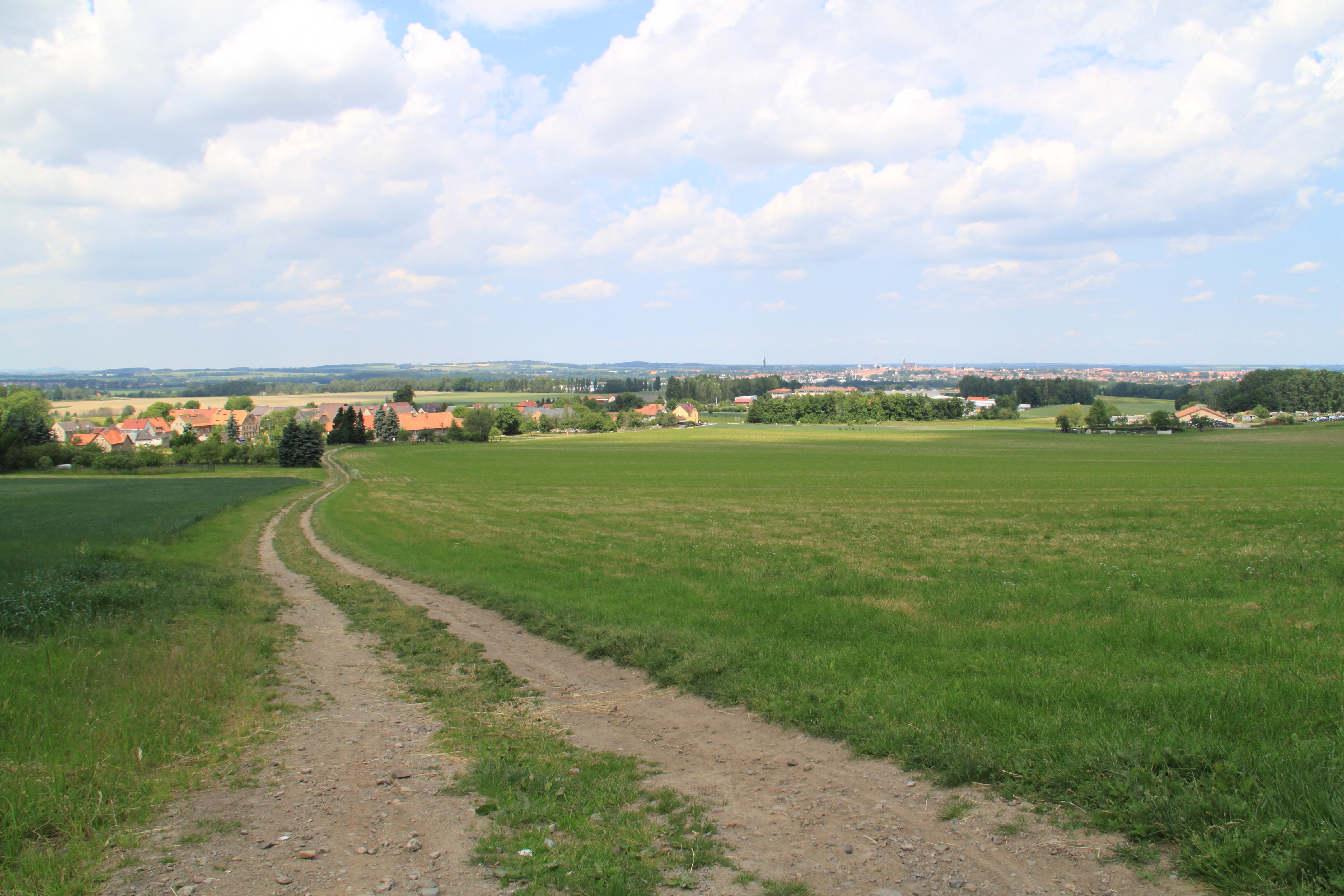 Impressionen Ebendörfel (Landkreis Bautzen) Hornjoserbsce: Puć k wojerskemu pomnikej nad Bělšecami